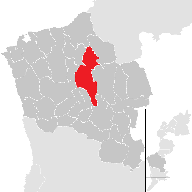 Bezirk Oberwart